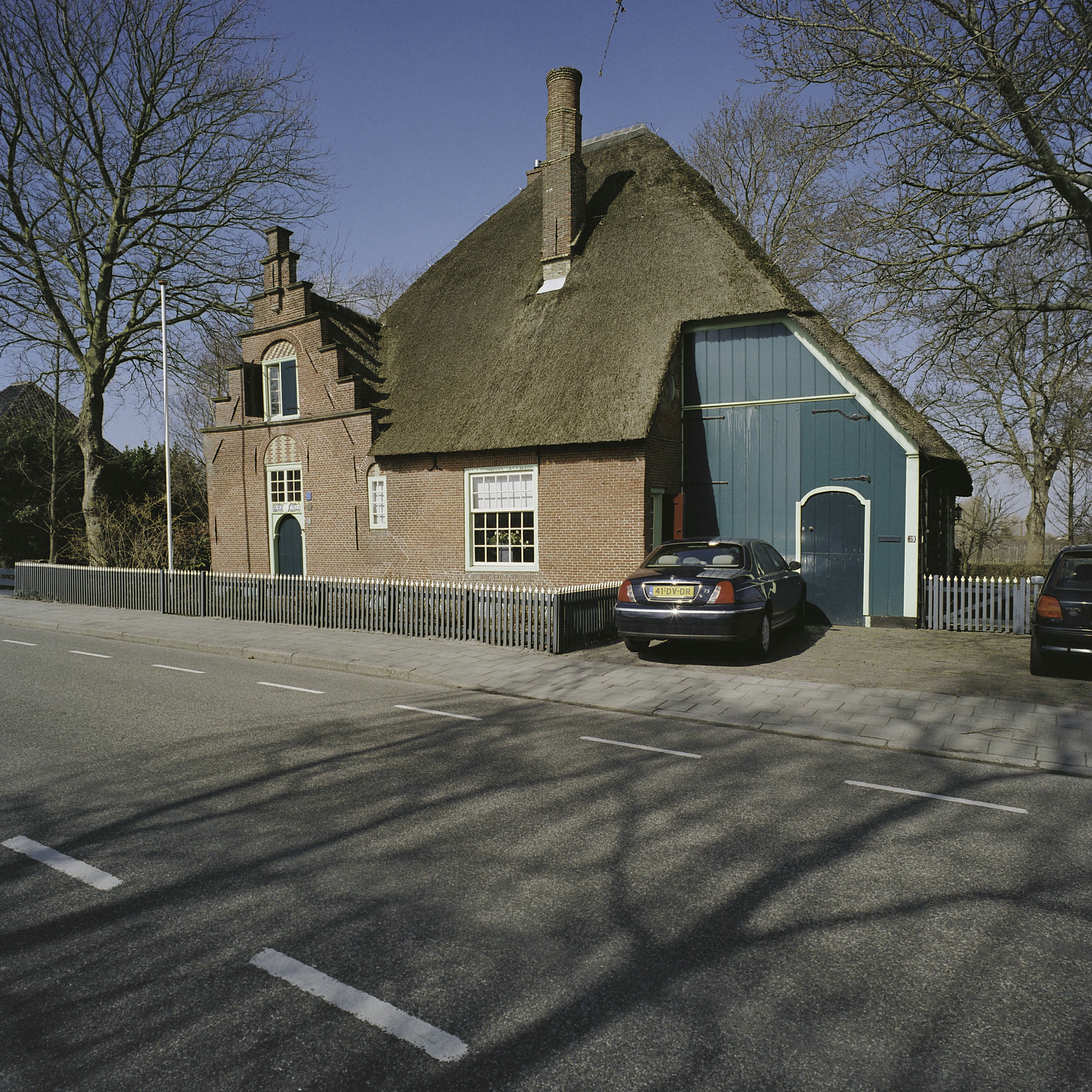 De Samaritaan: Boerderij heeft een inspringende houten darsdeur en voorhuis met trapgevel (opmerking: Gefotografeerd voor Monumenten In Nederland Noord-Holland)